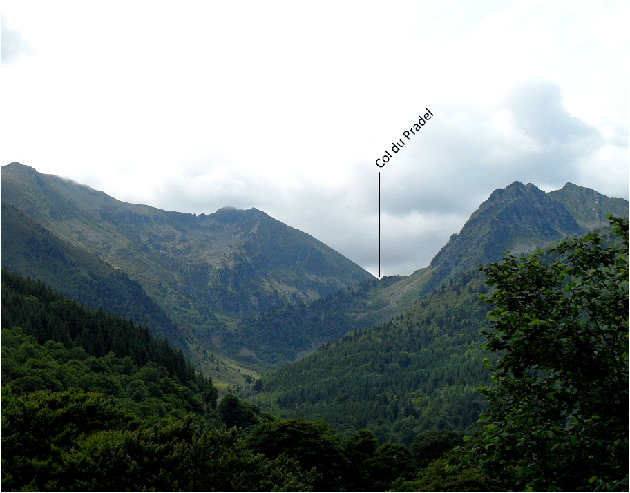 Vue du col du Pradel depuis l'aval des gorges du Rébenty